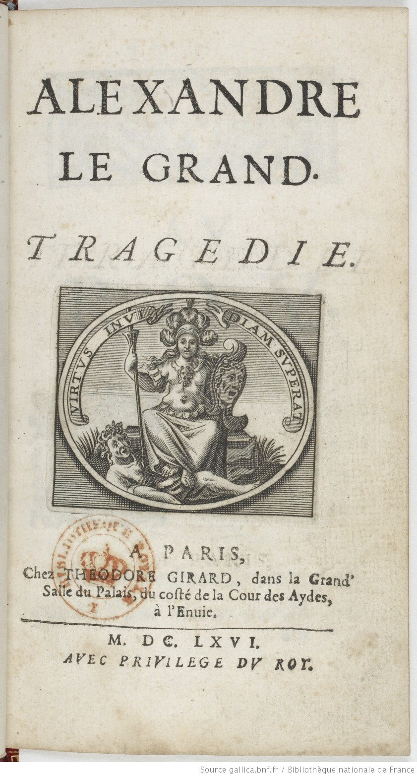 Frontispice de la première édition d'Alexandre le Grand de Jean Racine.